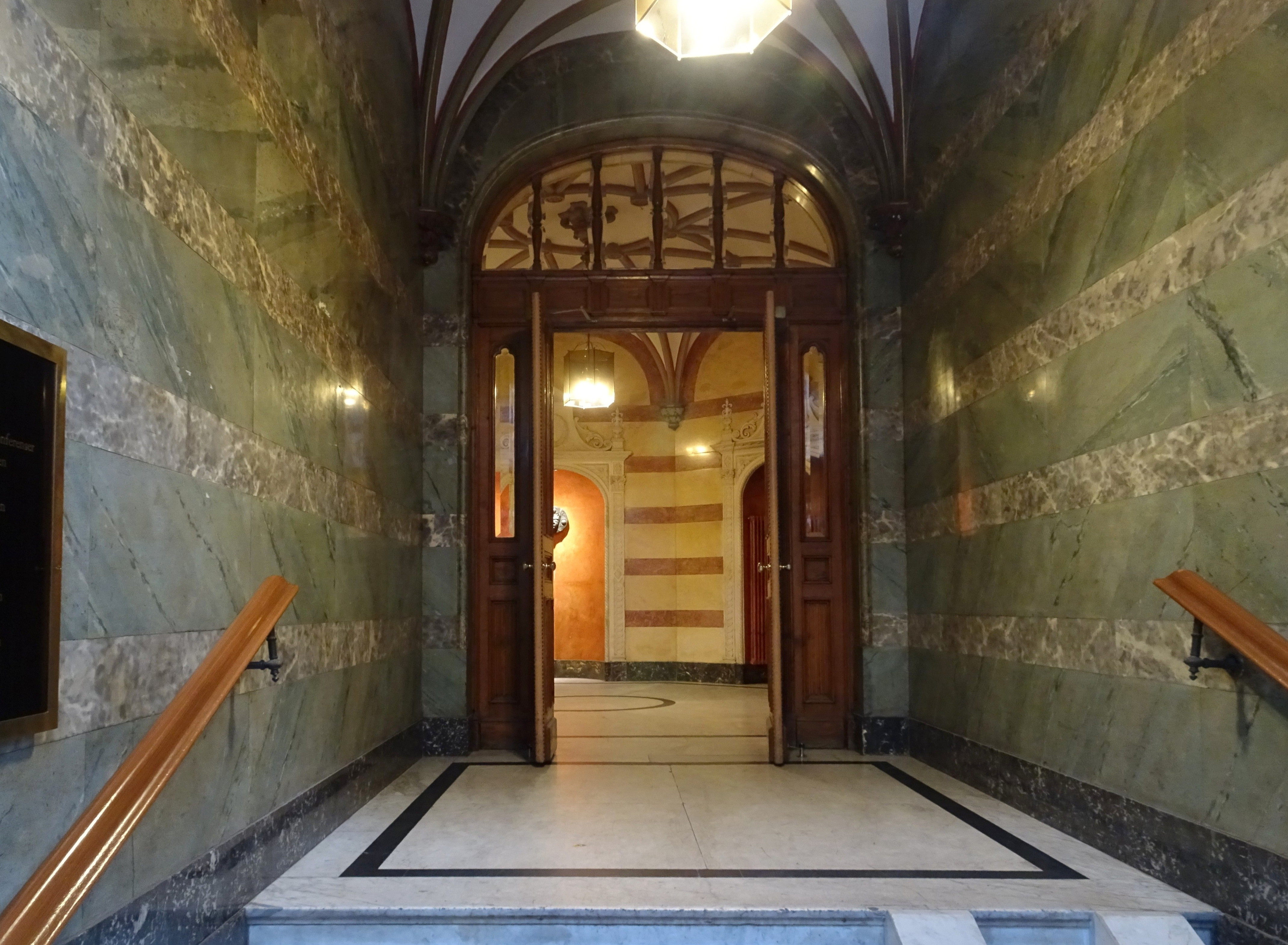 Daneliuska huset vid Stureplan, entrehall